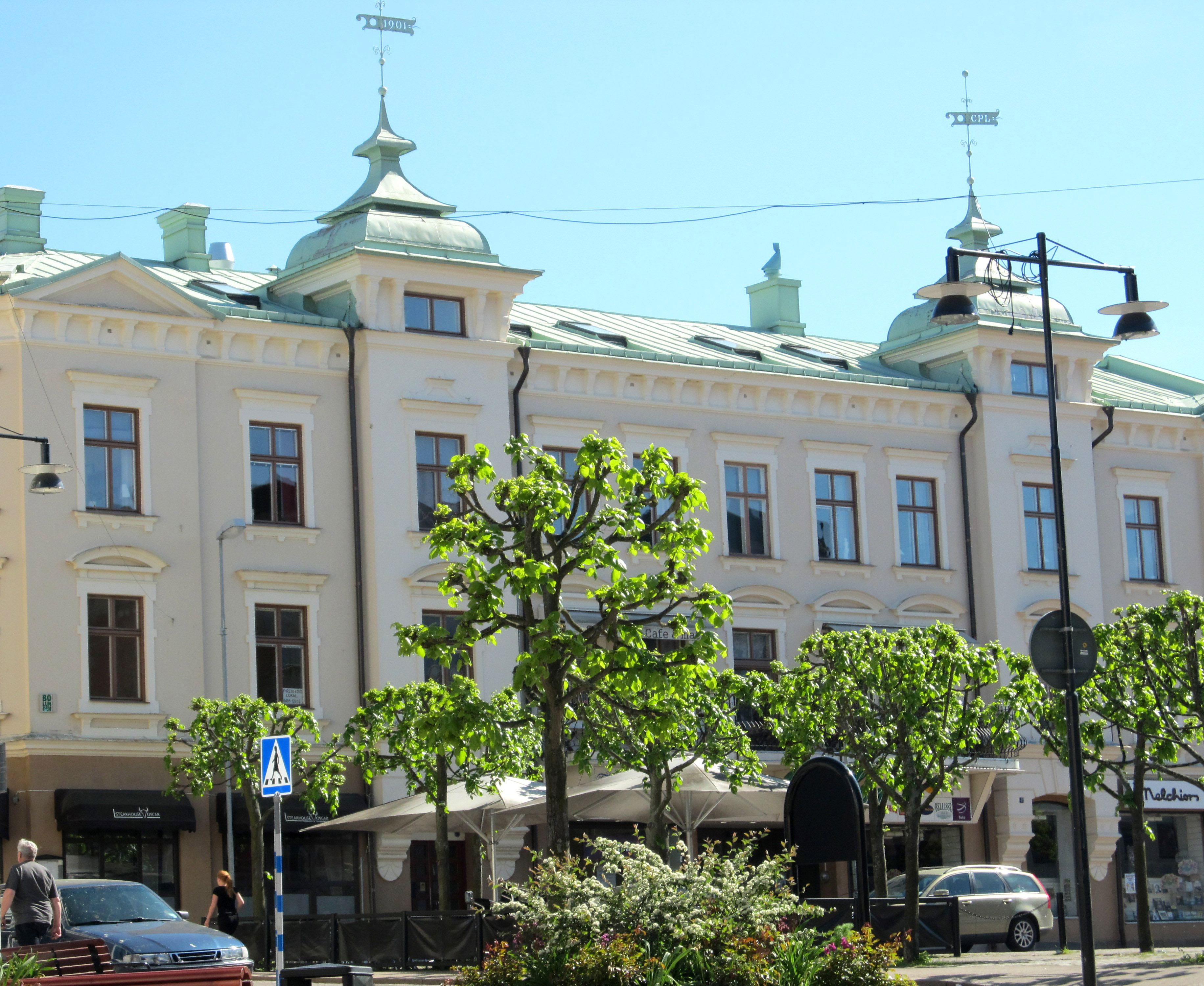 Lindströmska huset vid Lilla torget i Oskarshamn. Byggt 1901.